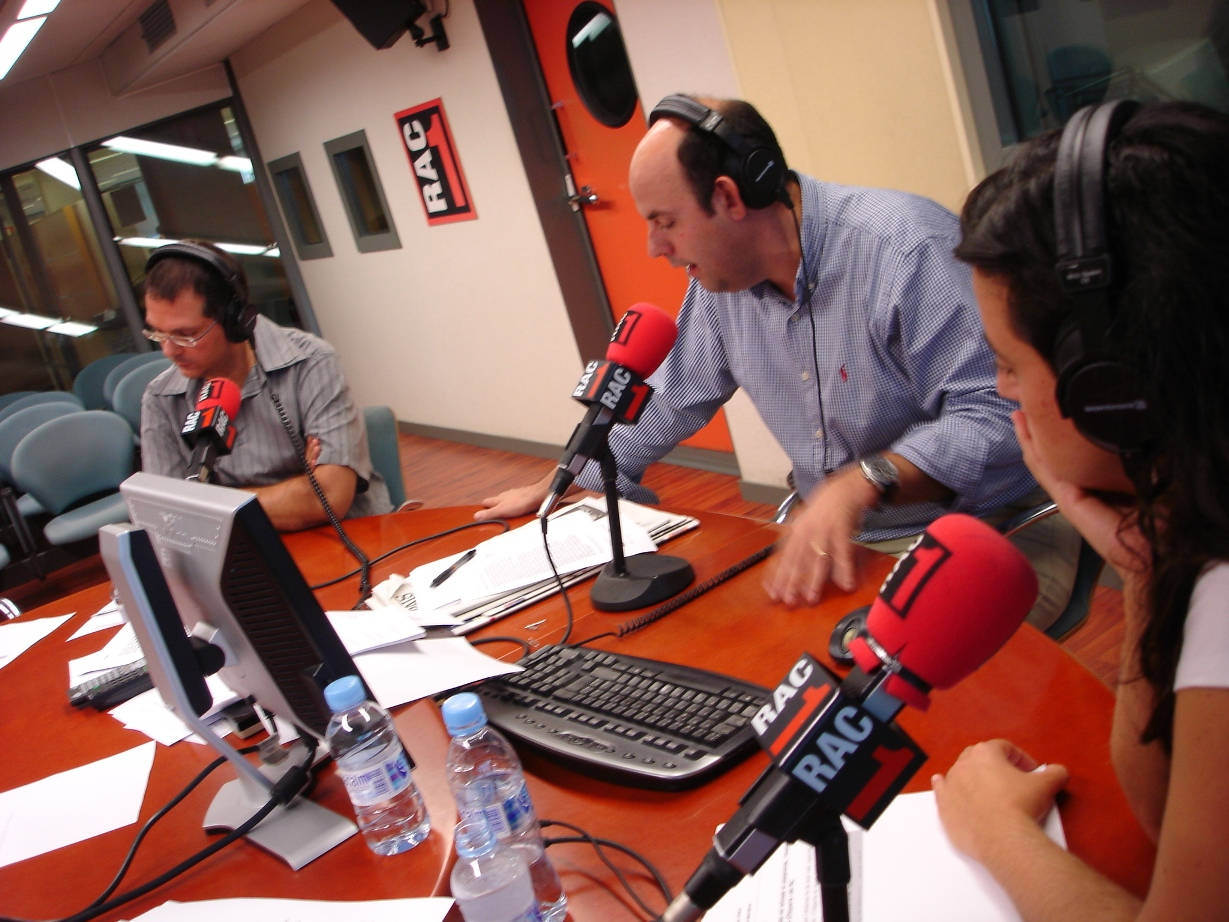 Imatge del programa "El món a RAC 1", en directe pocs minuts després de les 6 del matí.